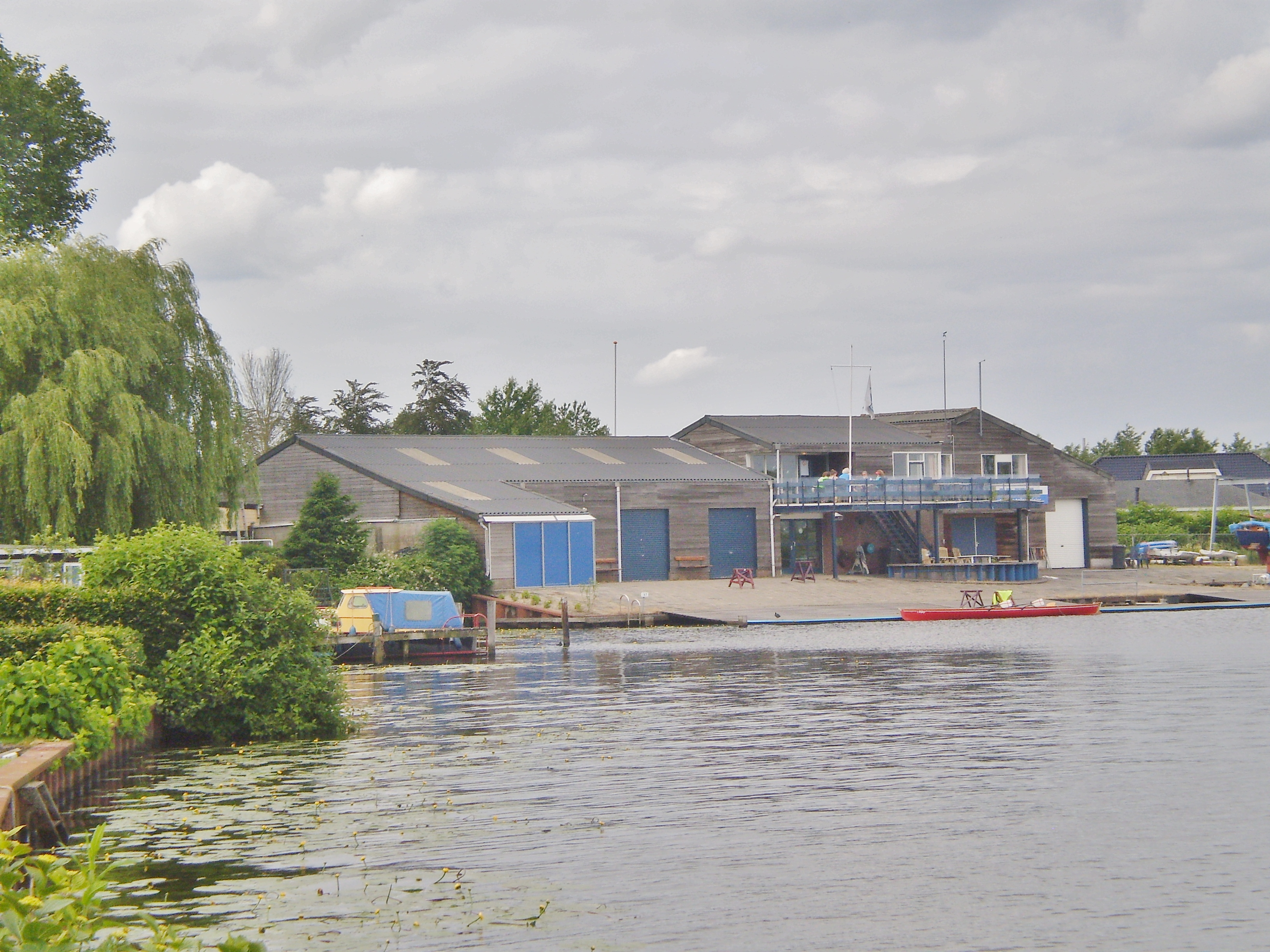 Vanuit de richting Amersfoort